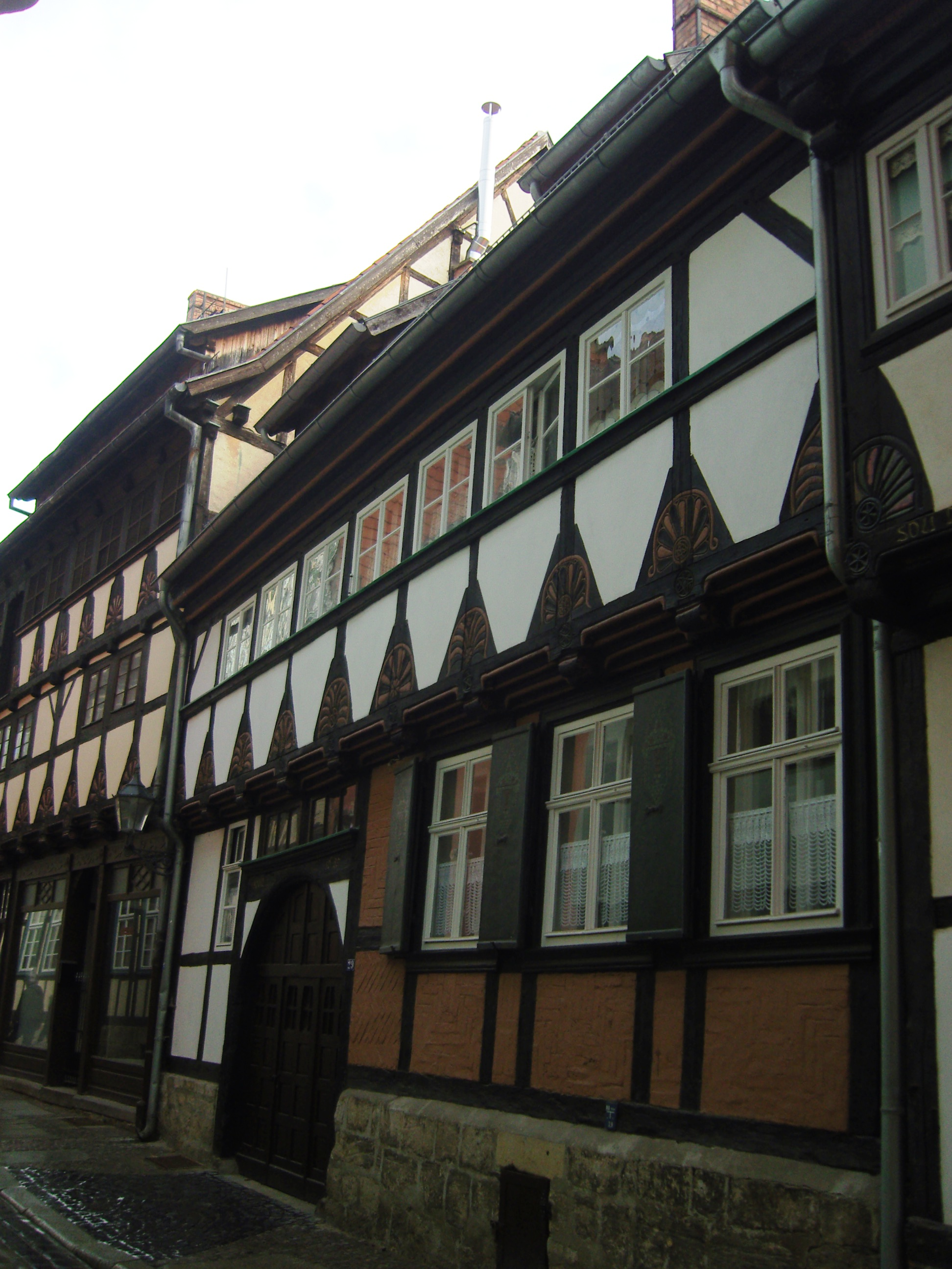 Denkmalgeschütztes Wohnhaus in der Straße Stieg 29 in Quedlinburg